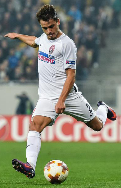 Заря - Герта 2:1